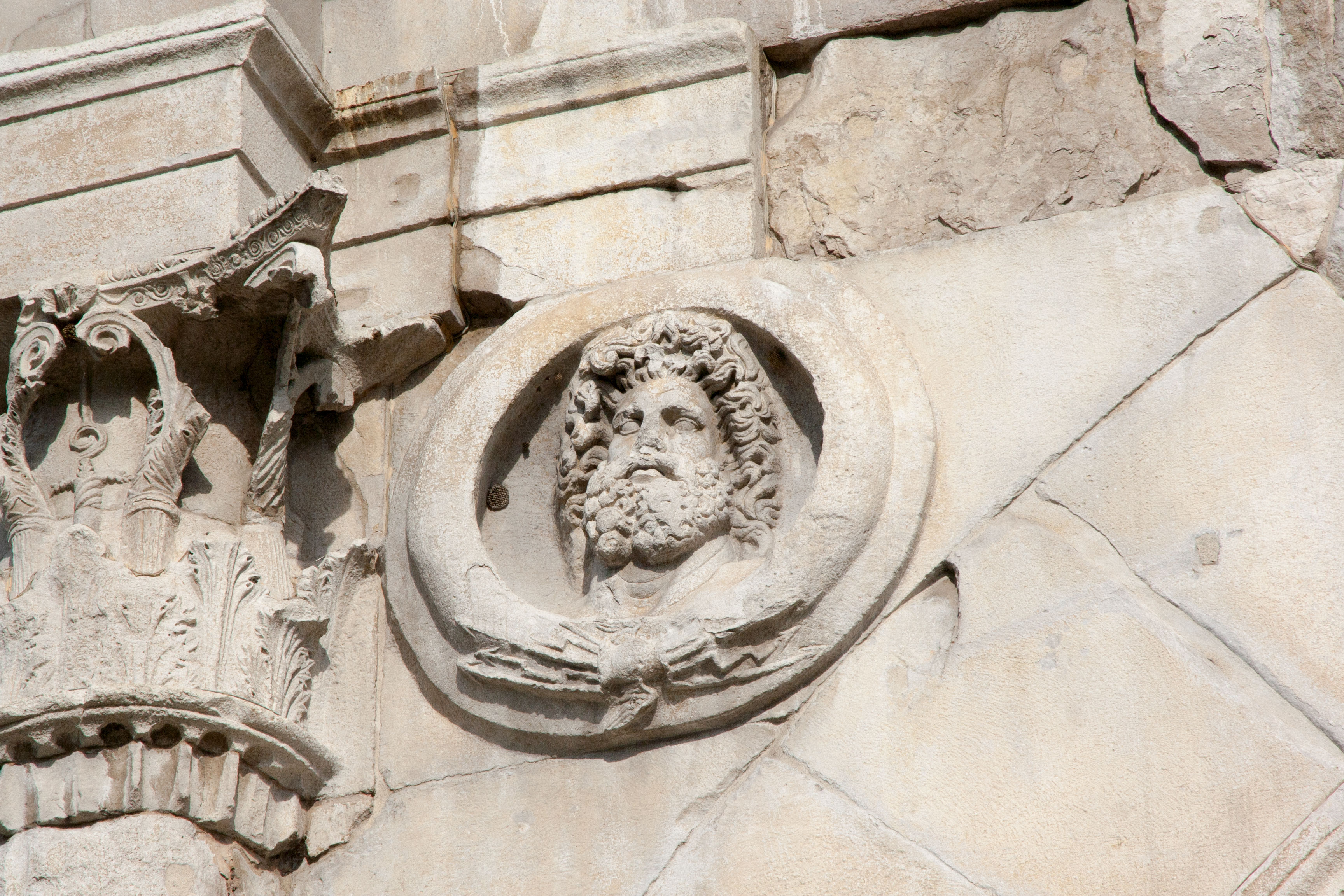 Arco di Augusto This is a photo of a monument which is part of cultural heritage of Italy.